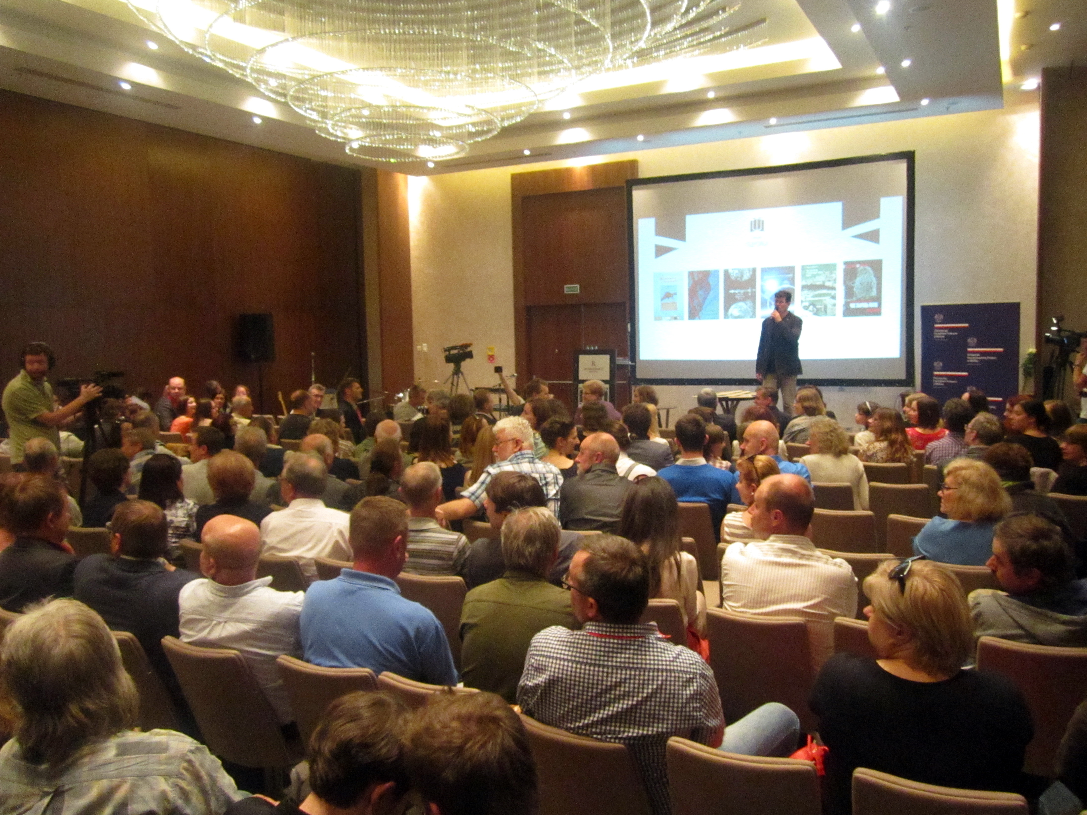 Цырымонія ўзнагароджання літаратурнай прэміяй ім. Гедройца. Мінск, 1 чэрвеня 2015.